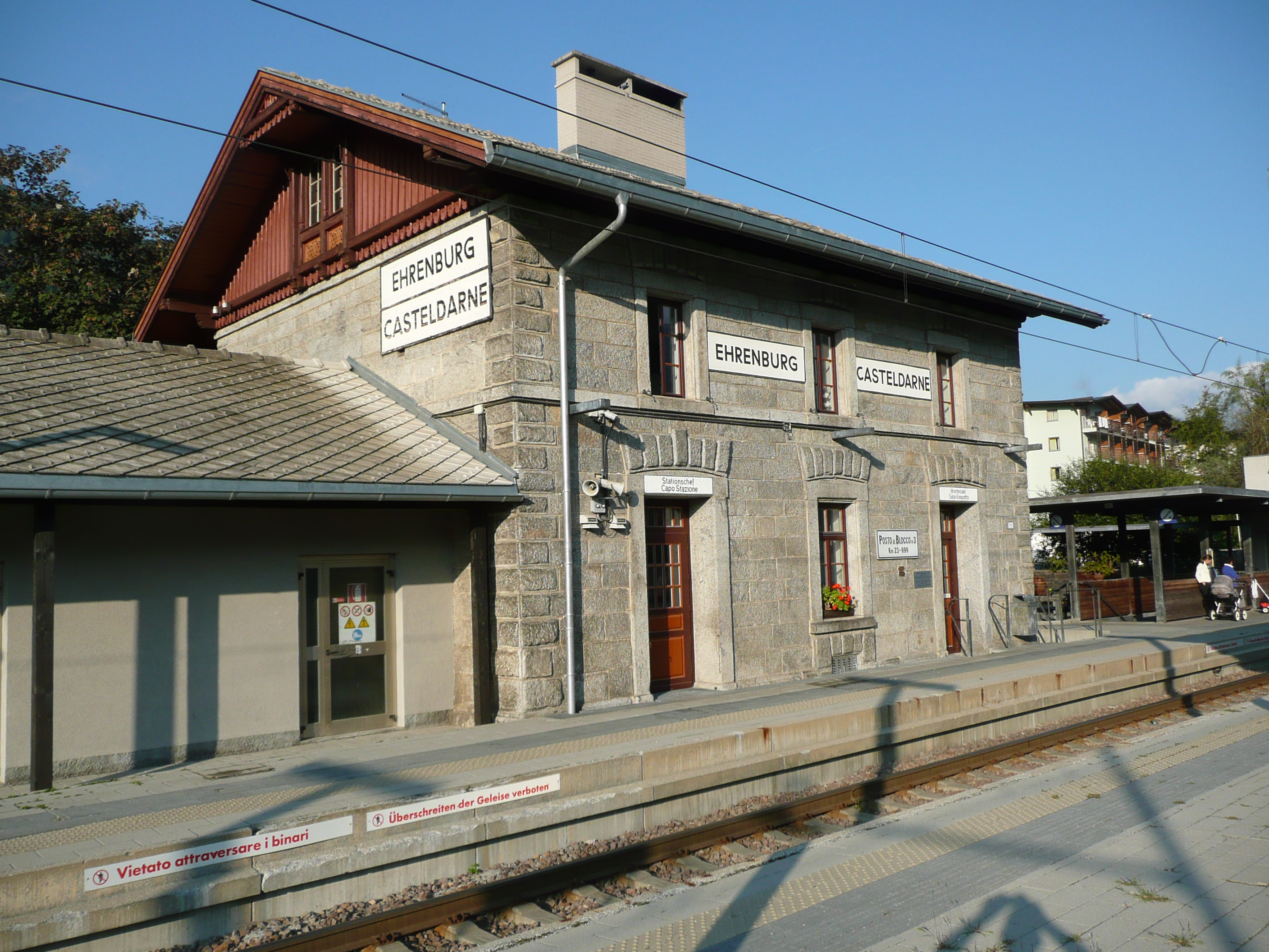 Bahnhof Ehrenburg Gleisseite